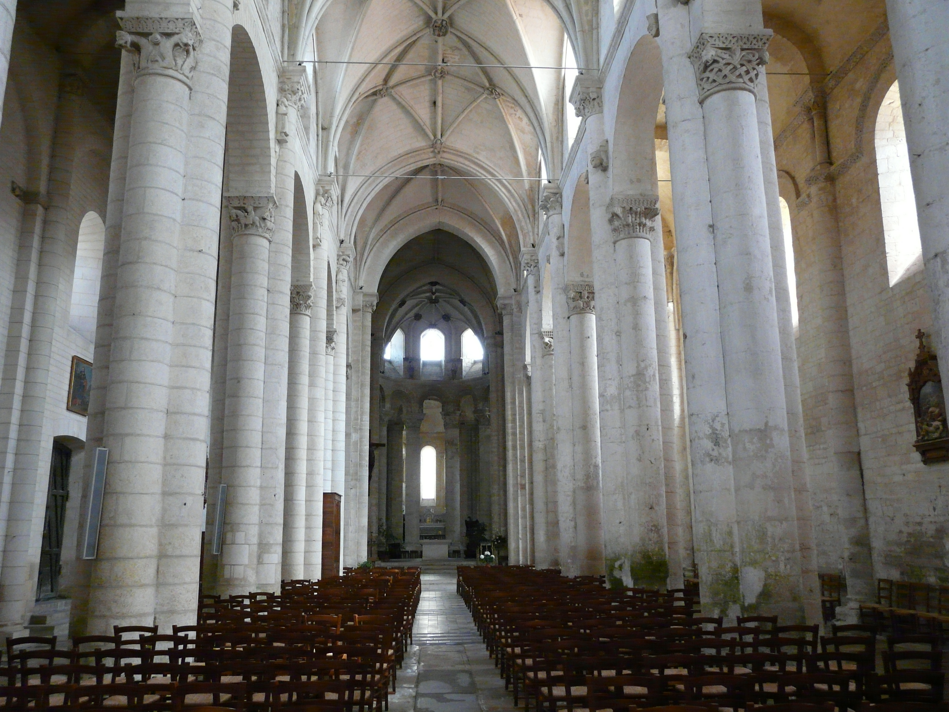 La nef de l'église abbatiale Saint-Pierre d'Airvault, Deux-Sèvres, France